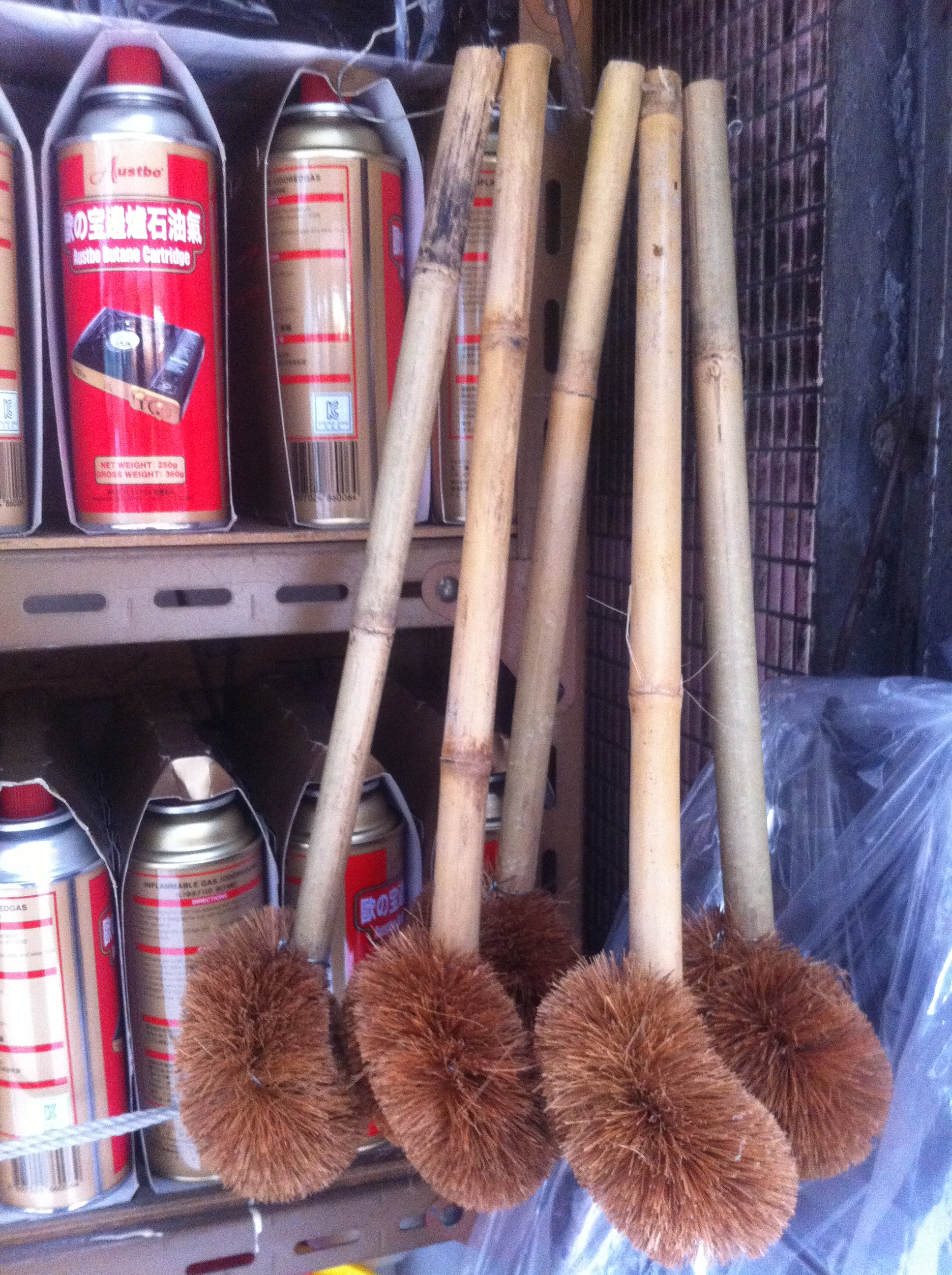 中文（香港）: 香港島西環 皇后大道西 商店